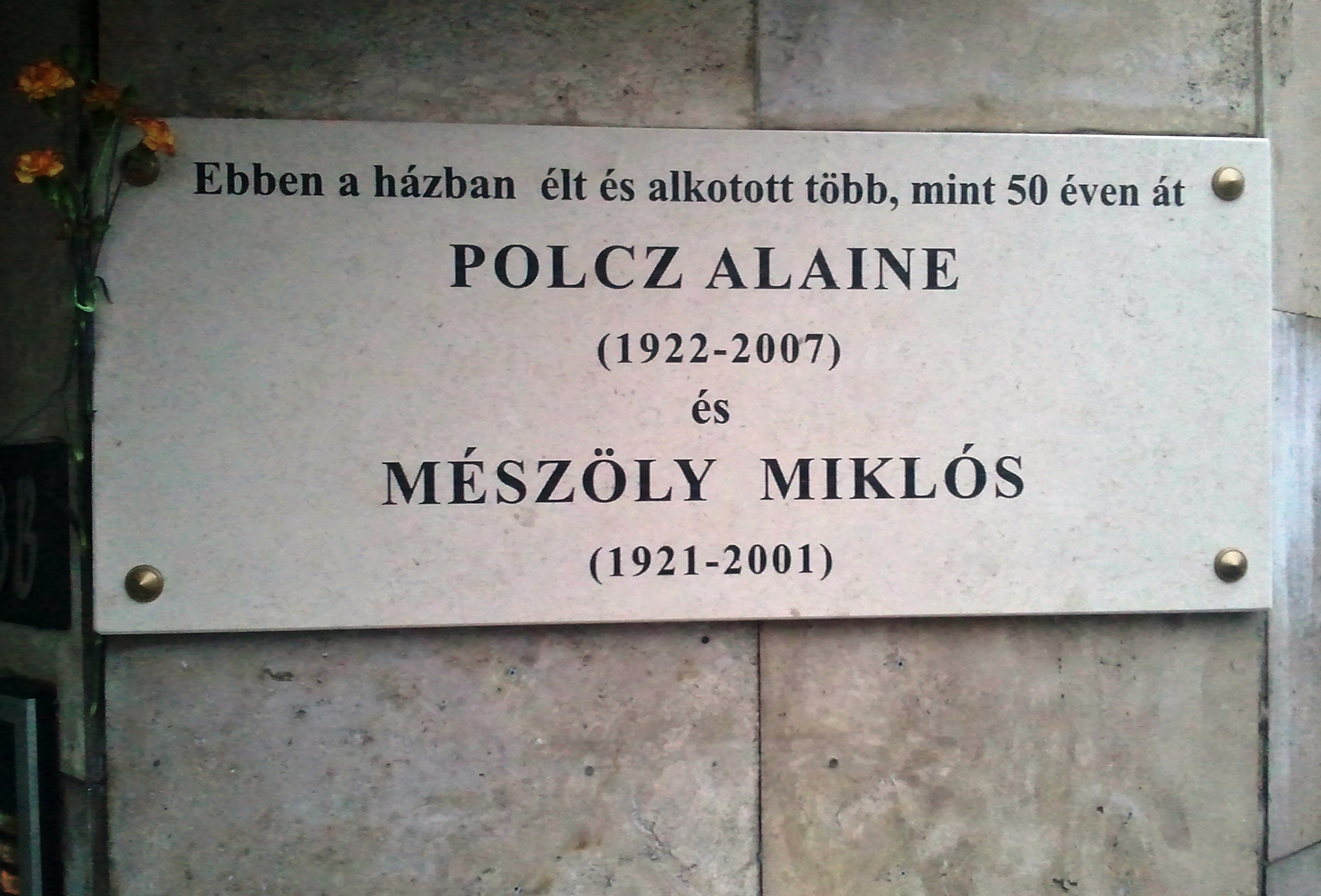 Polcz Alaine és Mészöly Miklós emléktábla. Budapest XII. kerület Városmajor utca 48A